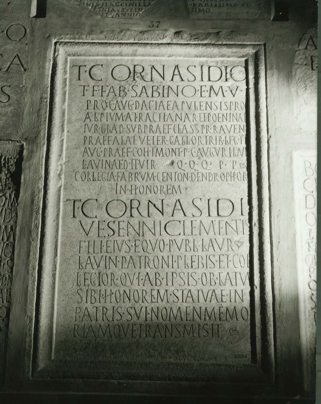 CIL IX, 5439 Carrera de Cornasidio Sabino, procurator Augusti